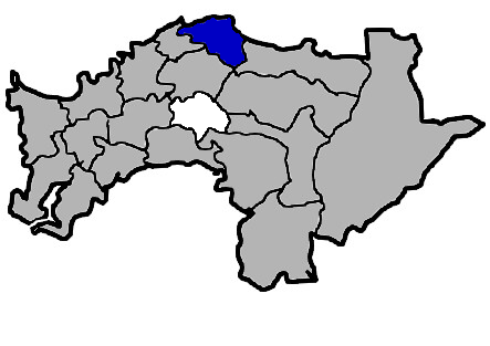 KaurJmeb為編輯中華民國臺灣省嘉義縣大林鎮，於2005年2月10日所繪。